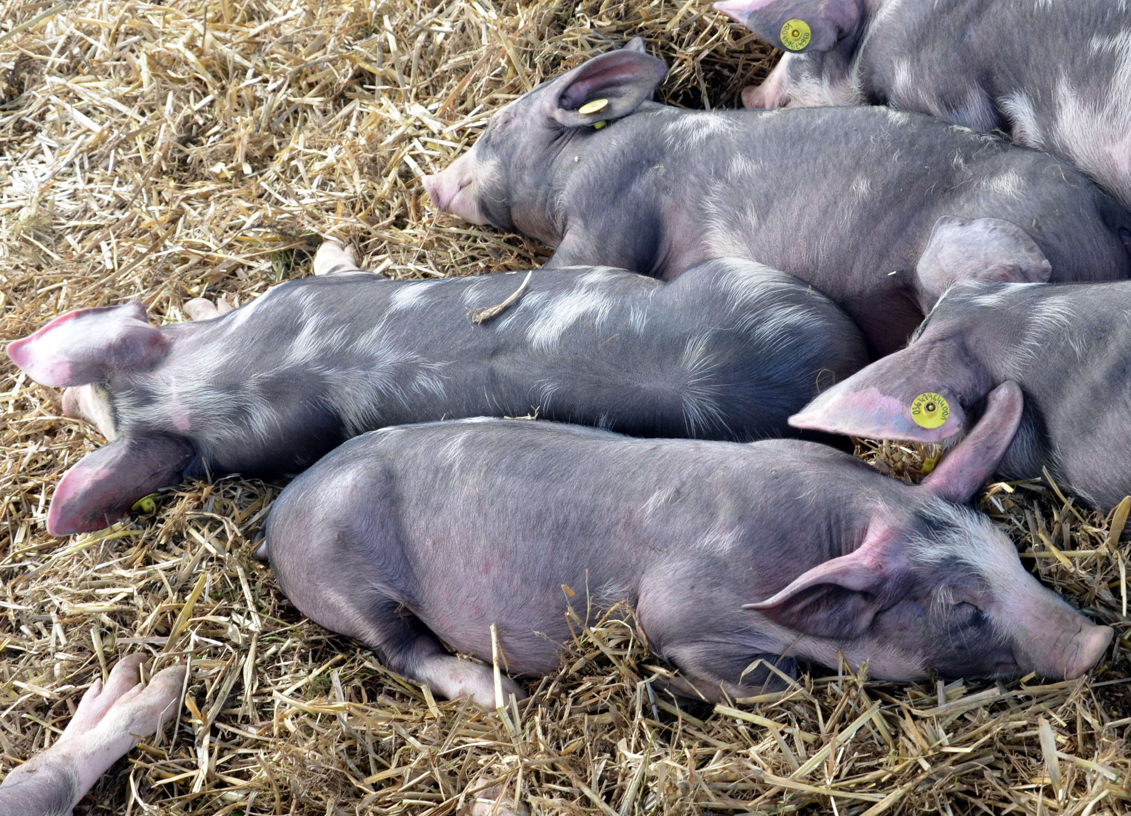 Schweine der polnischen Rasse "Złotnicka pstra"